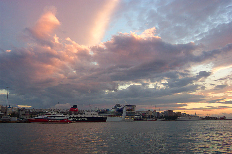 Piraeus harbor